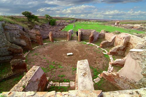 autore: coccobbello Descrizione: scavi di Ordona